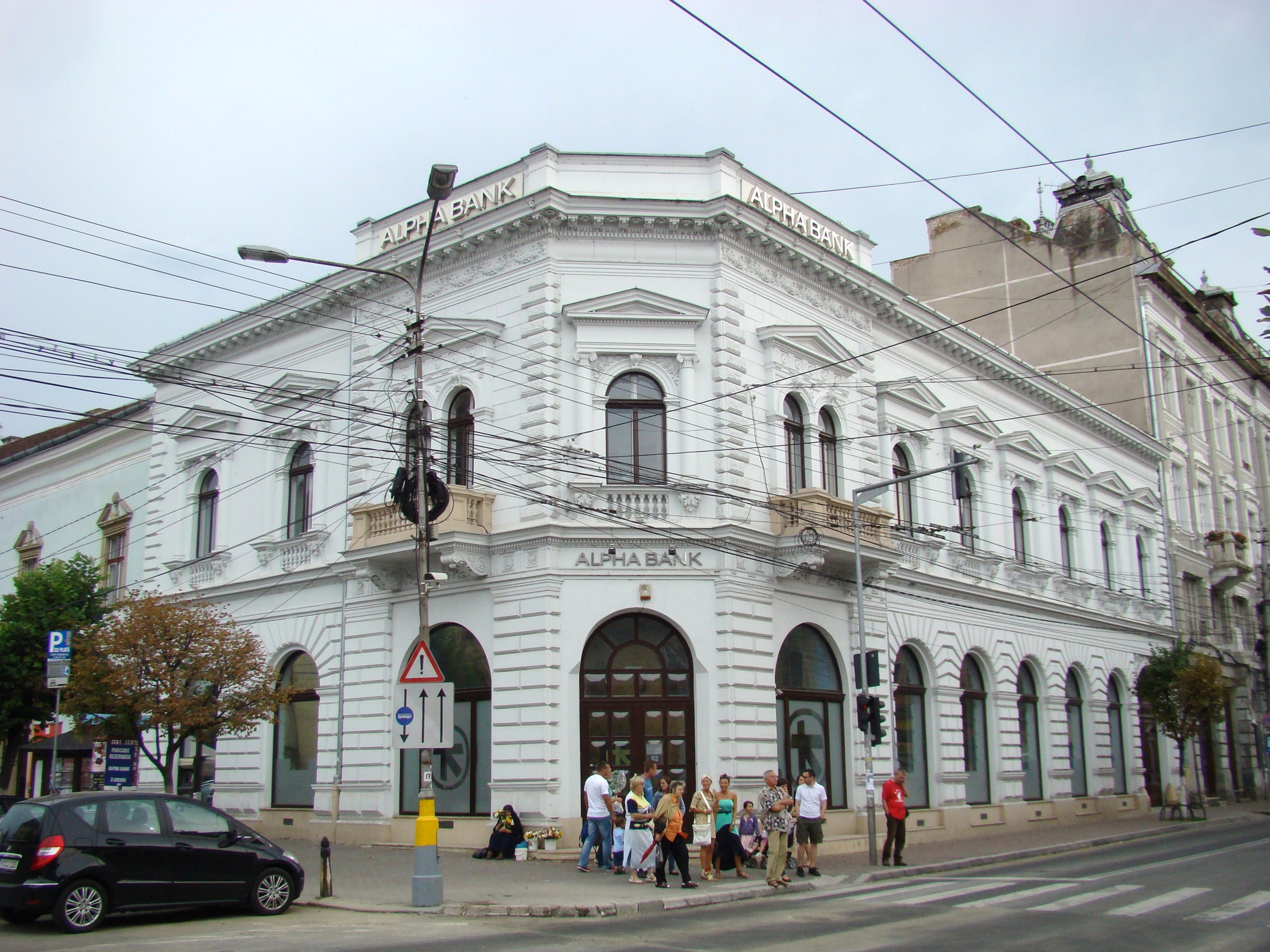 Clădire monument istoric, str. Memorandumului, nr.1 (în prezent Alpha Bank)